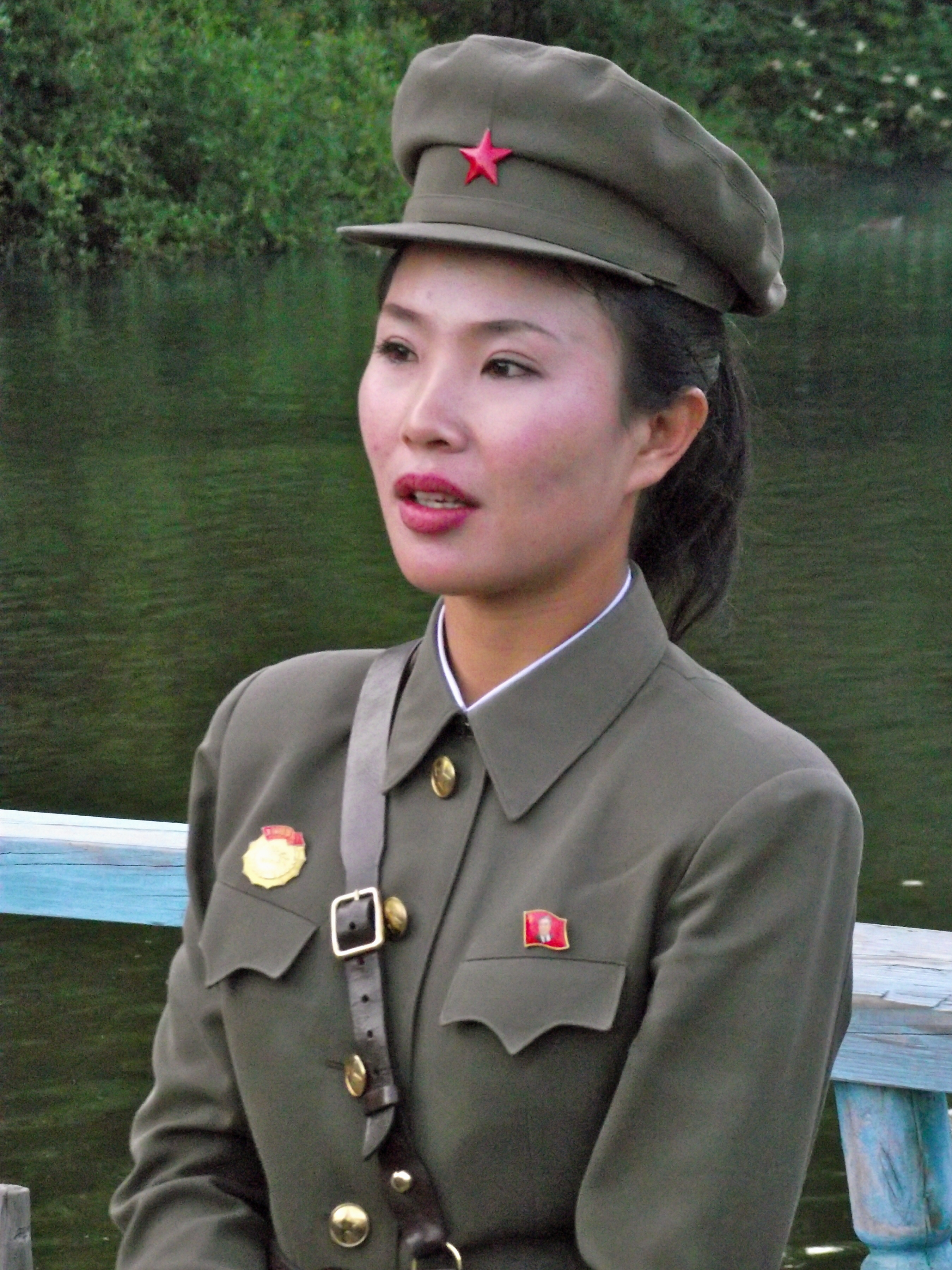 Rimyongsu Falls